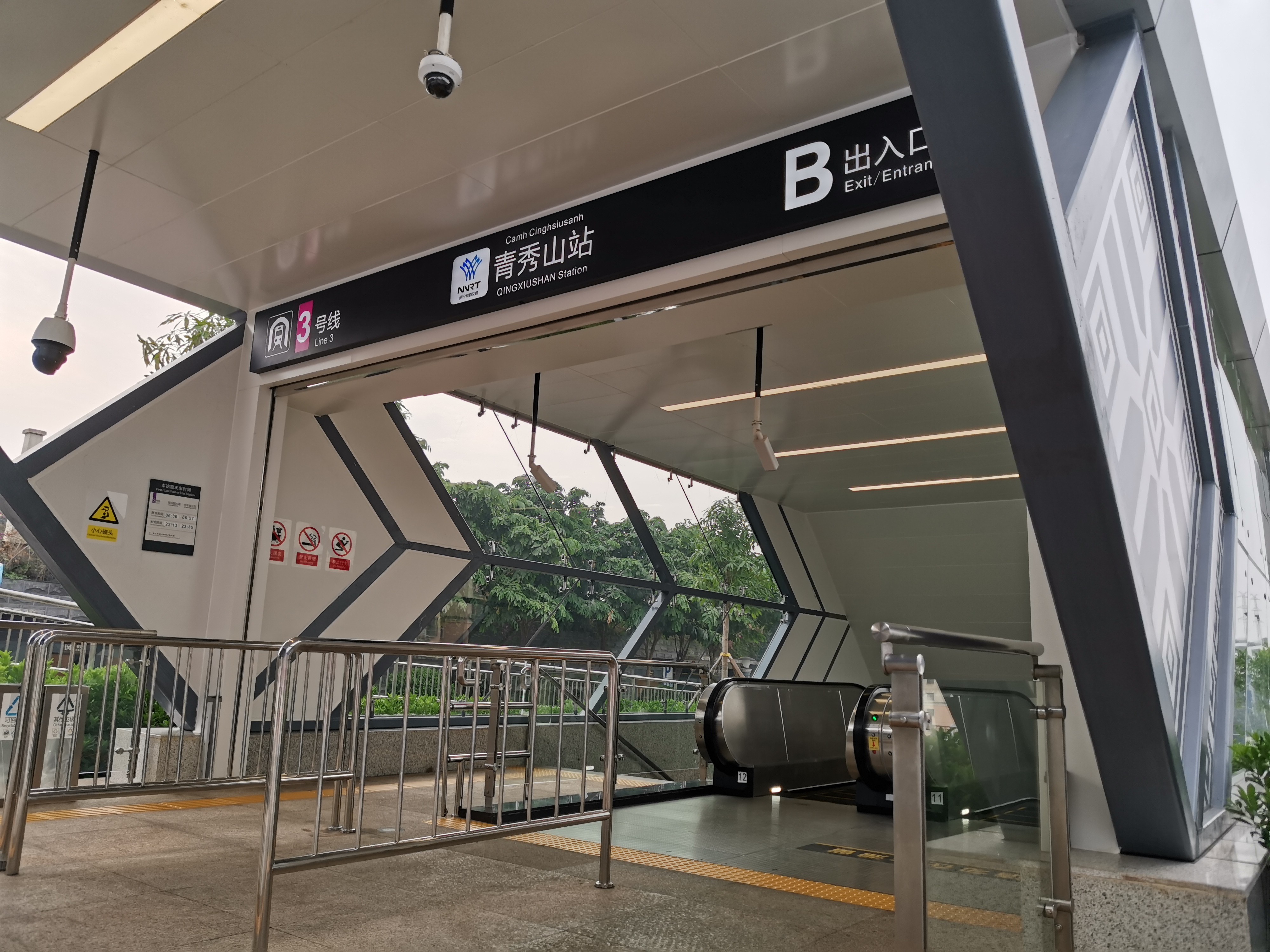 南宁轨道交通青秀山站站厅